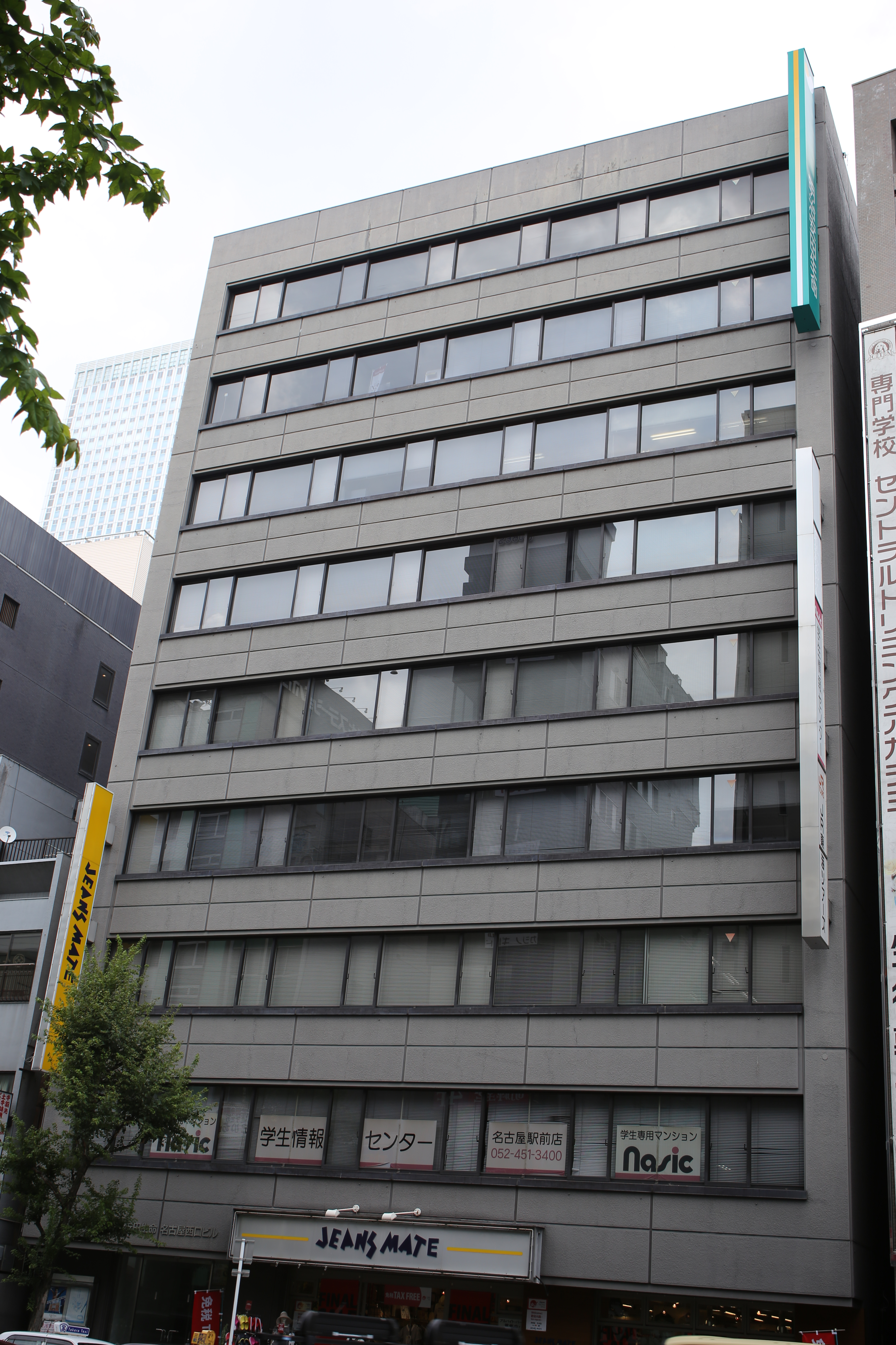 名古屋市中村区椿町の明治安田生命名古屋西口ビルを西側公道南側より撮影